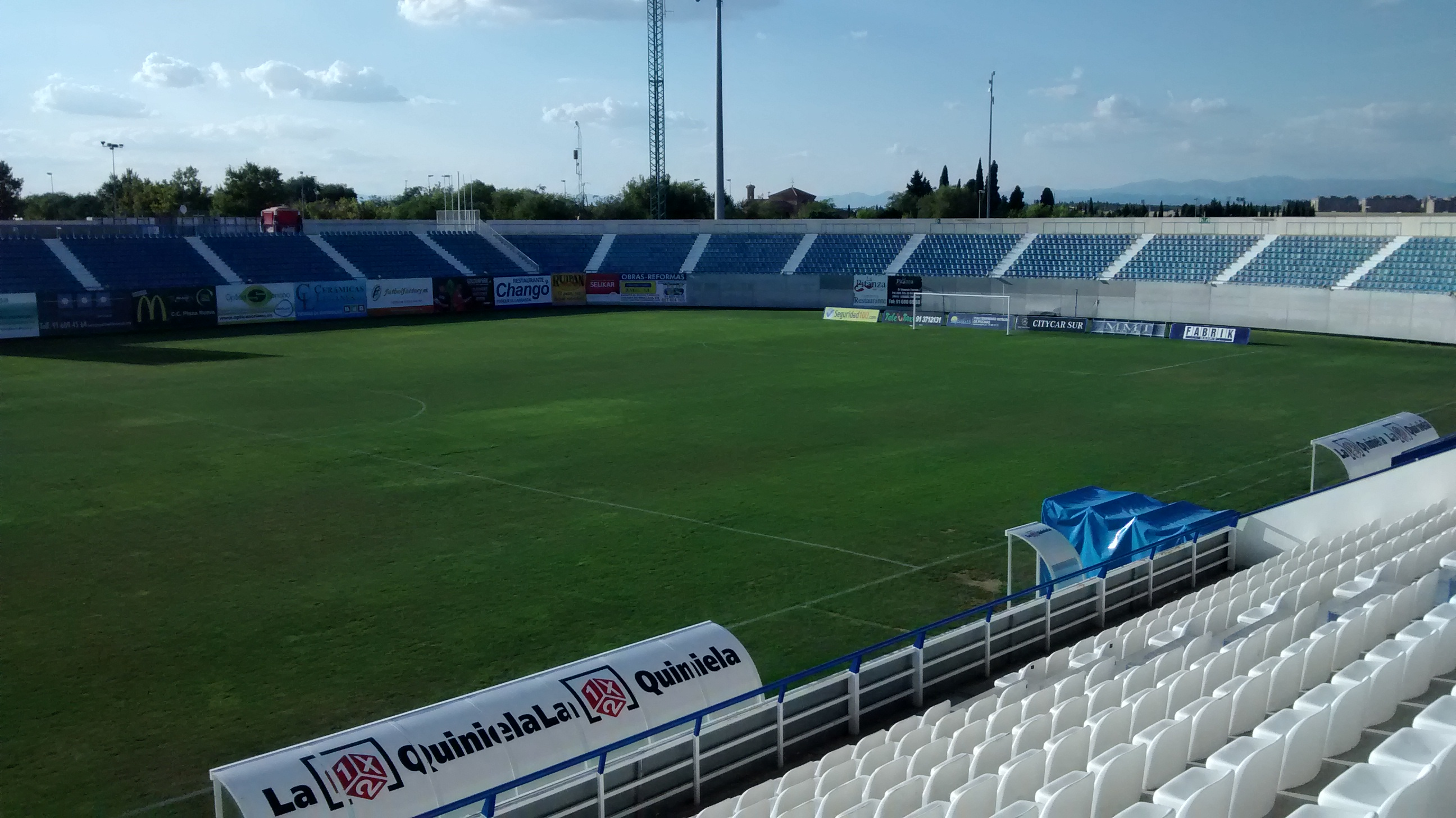 Fondo norte del estadio municipal de Butarque